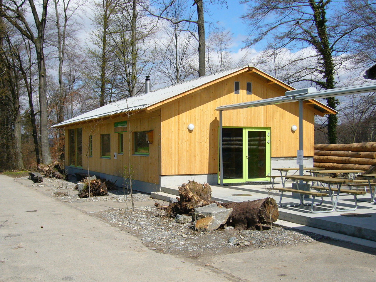 Naturschule auf dem Höckler auf der Zürcher Allmend.